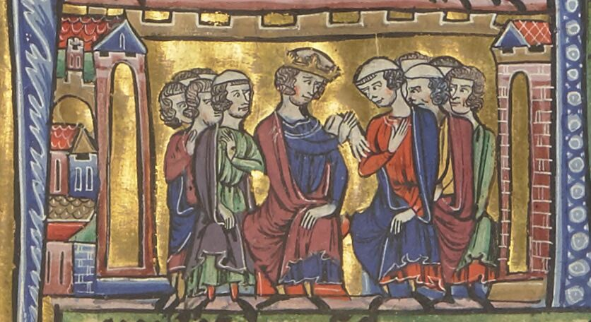 Jean II Comnène et Raymond de Poitiers